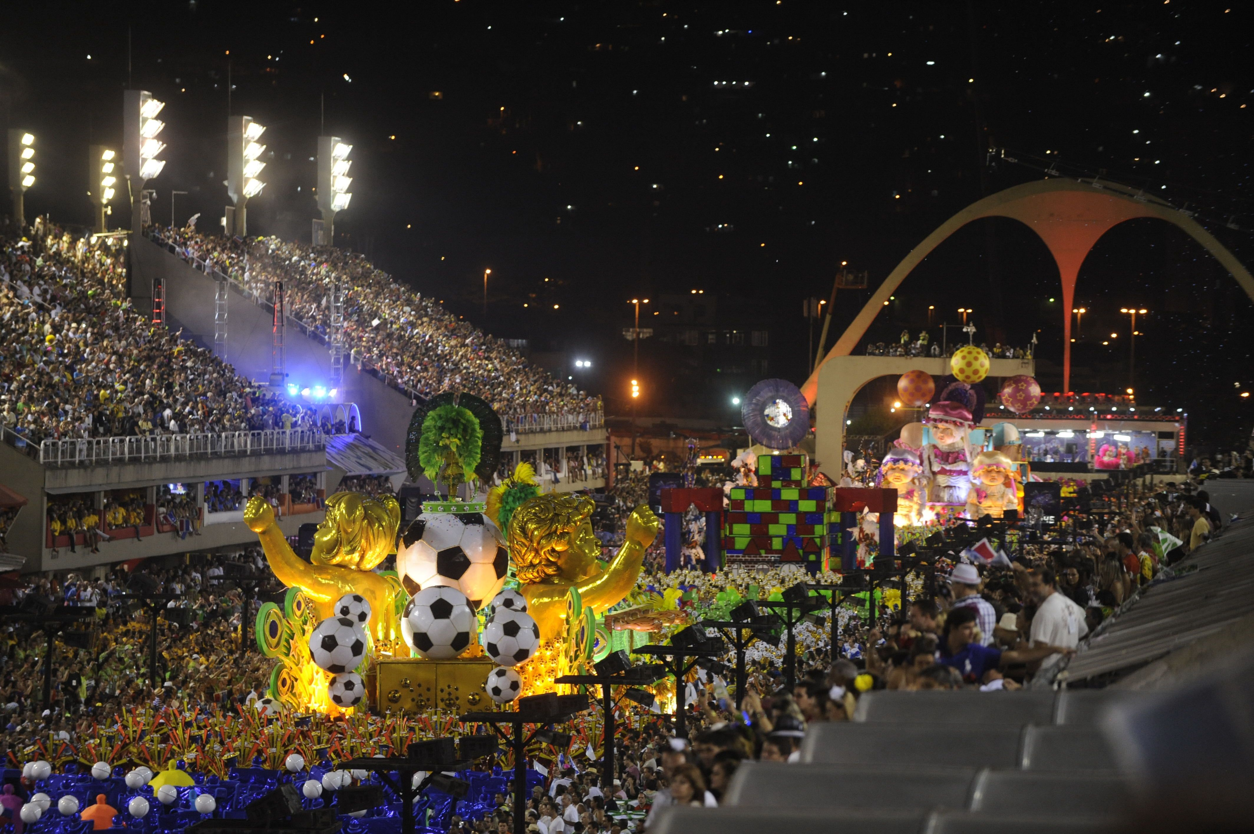 Desfile da União da Ilha do Governador no carnaval de 2014. Fernando Frazão/Agência Brasil